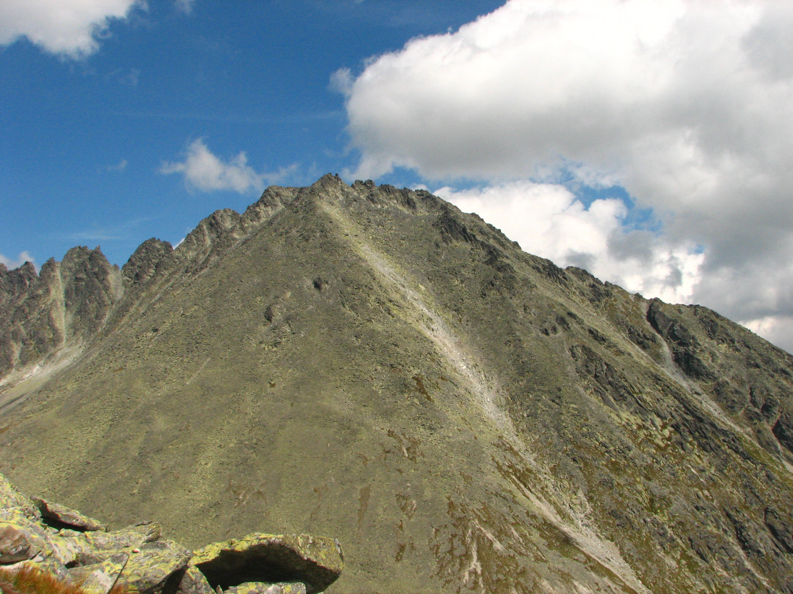 Kończysta (słow. Končistá) widziana z Tępej (słow. Tupá).